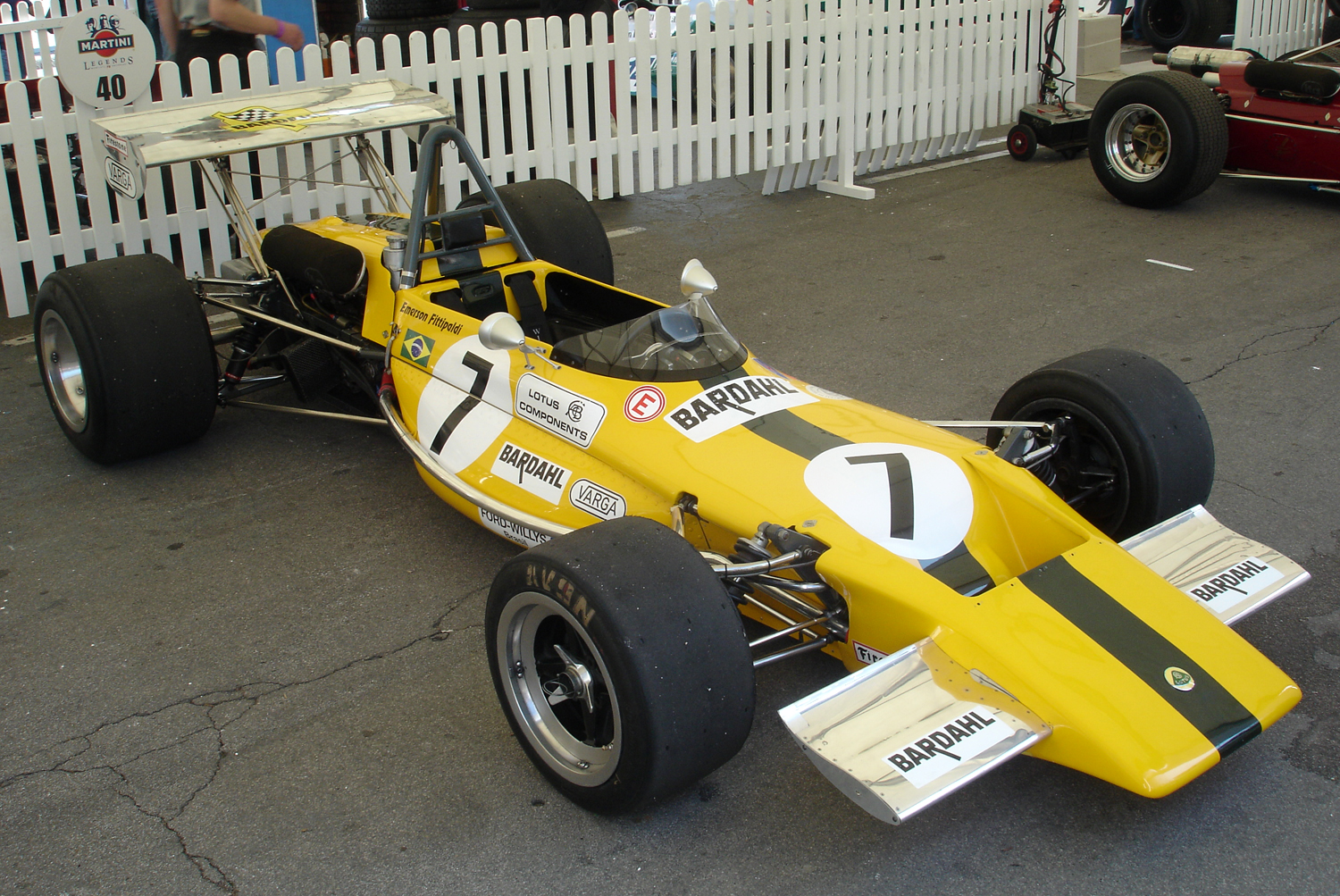 Lotus 69 d'Emerson Fittipaldi exposat al festival Martini Legends (commemoració del 75 aniversari del Circuit de Montjuïc)